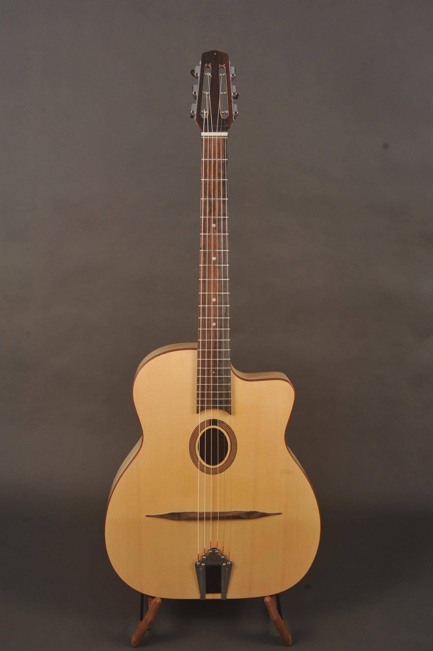 Der orginalgetreue Nachbau der Maccaferri o-Type Gitarre wurde 2018 in Alpenfichte und Ahorn ausgeführt. Gitarrenbauer: Jürgen Lutschkowski, Hamm